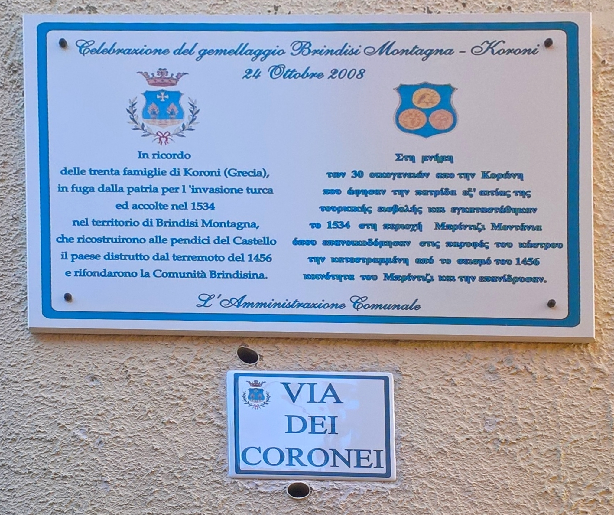 Via dei Coronei La targa è tuttalpiù storicamente errata, riportante la lingua greca moderna come seconda lingua, come per indicare che furono i greci a popolare l'abitato, mentre Brindisi di Montagna fu colonizzata nel XV secolo da esuli albanesi provenienti dalla Grecia (vedi Arvaniti) come tante altre località del sud d'Italia. Oggi la comunità non parla la lingua albanese e non ha memoria storica arbëreshe. Agli storici risulta una targa vergognosa e tendente al filoellenismo oltre che all'ignoranza sulla tematica.